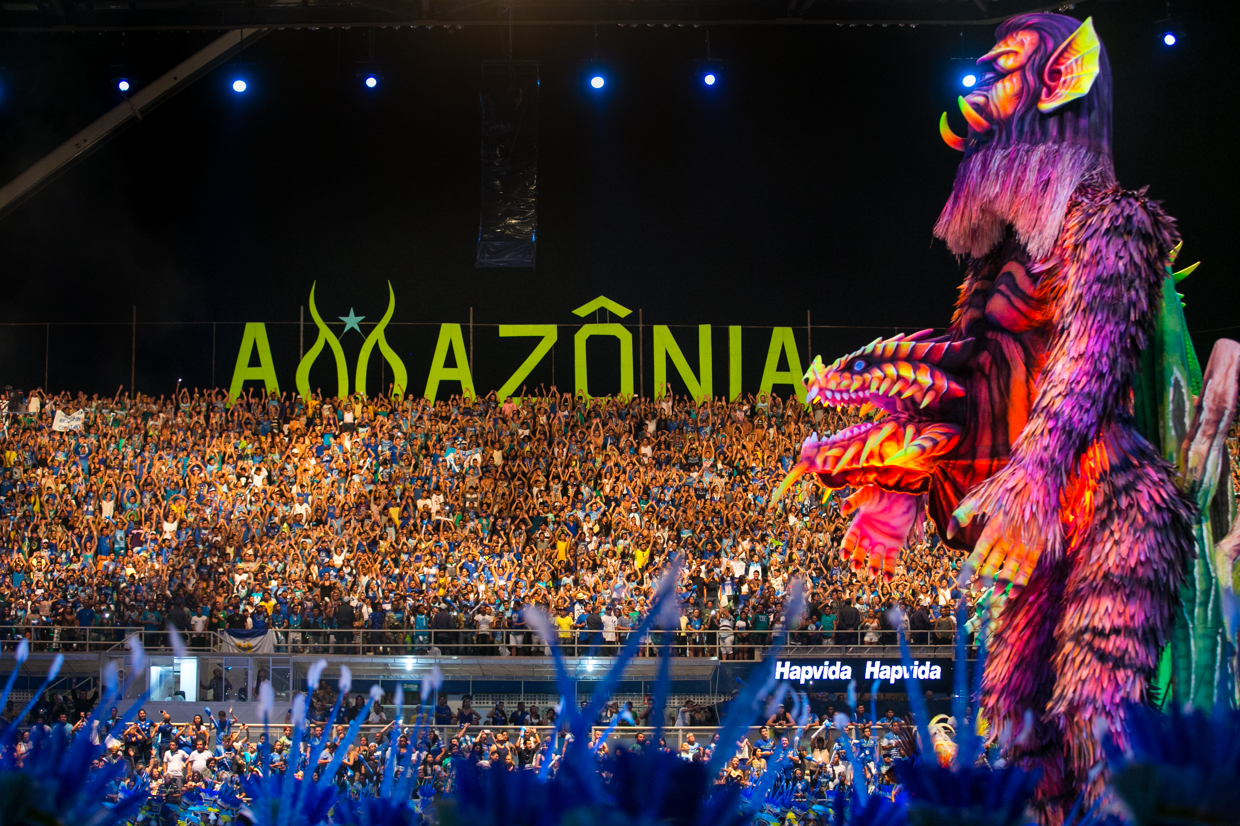 Apresentação do Boi Caprichoso no Festival Folclórico de Parintins de 2015.